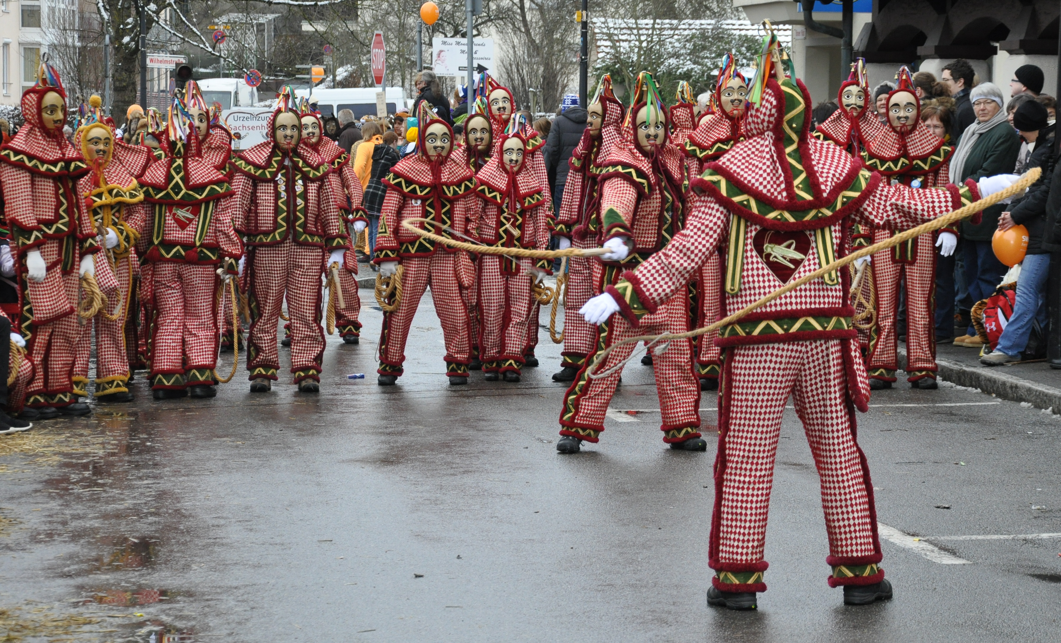 Teilnehmer der Schneller-WM: Kindinger Fosanegl, Kinding (Altmühltal, Oberayern) Fotografiert beim Landschaftstreffen der Vereinigung Schwäbisch-Alemannischer Narrenzünfte (VSAN) 2015 in Weingarten; Narrensprung am Sonntag, 25. Januar 2015